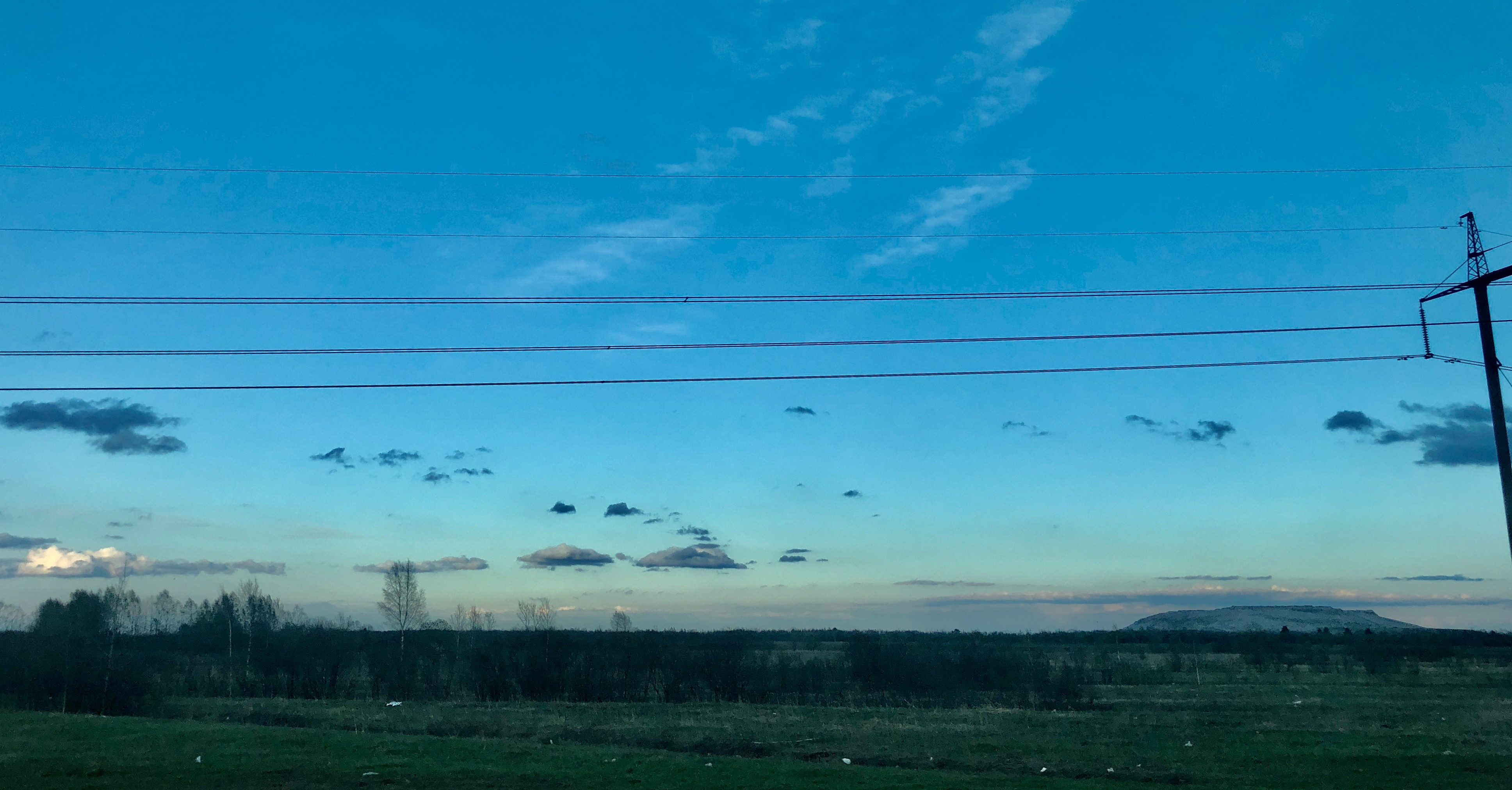 Вид на полигон Новый свет с Е95